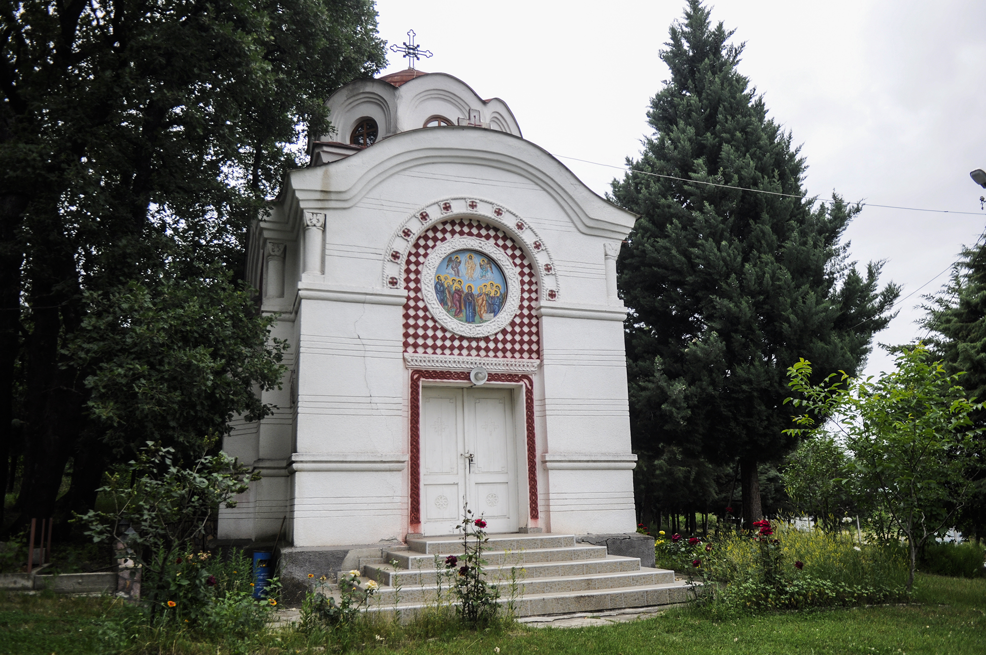 Црквата Свети Спас во Бунарџик, ја опкружува убава природа.